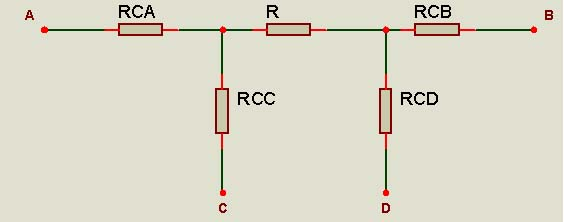 Circuito equivalente de un reistor de bajo valor